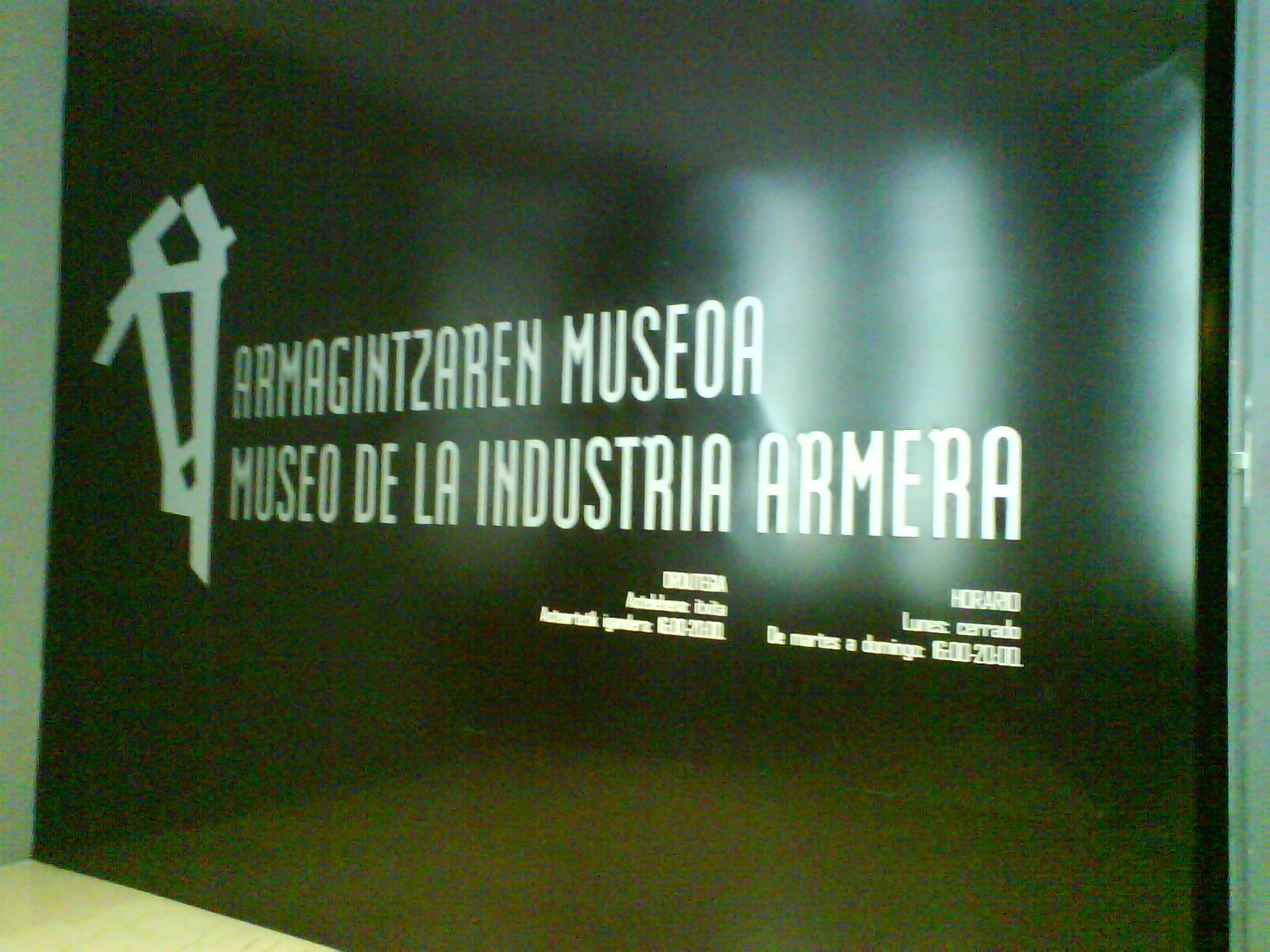 Entrada al Museo de la Industria Armera de Eibar (Gipuzkoa).